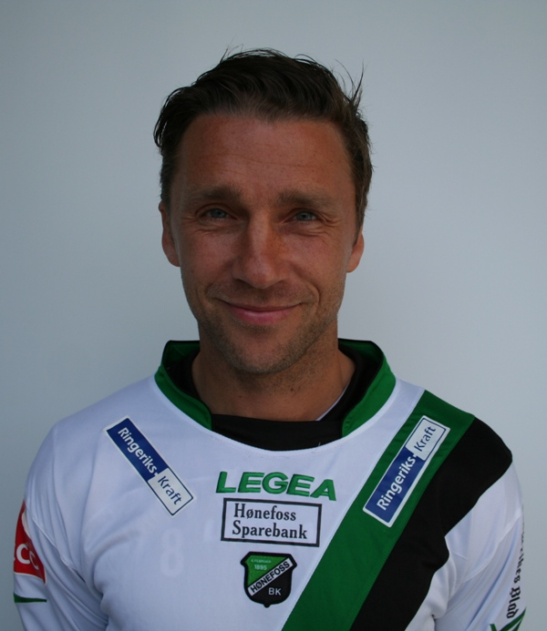 David Hansen, norsk fotballspiller som spiller for Hønefoss Ballklubb.